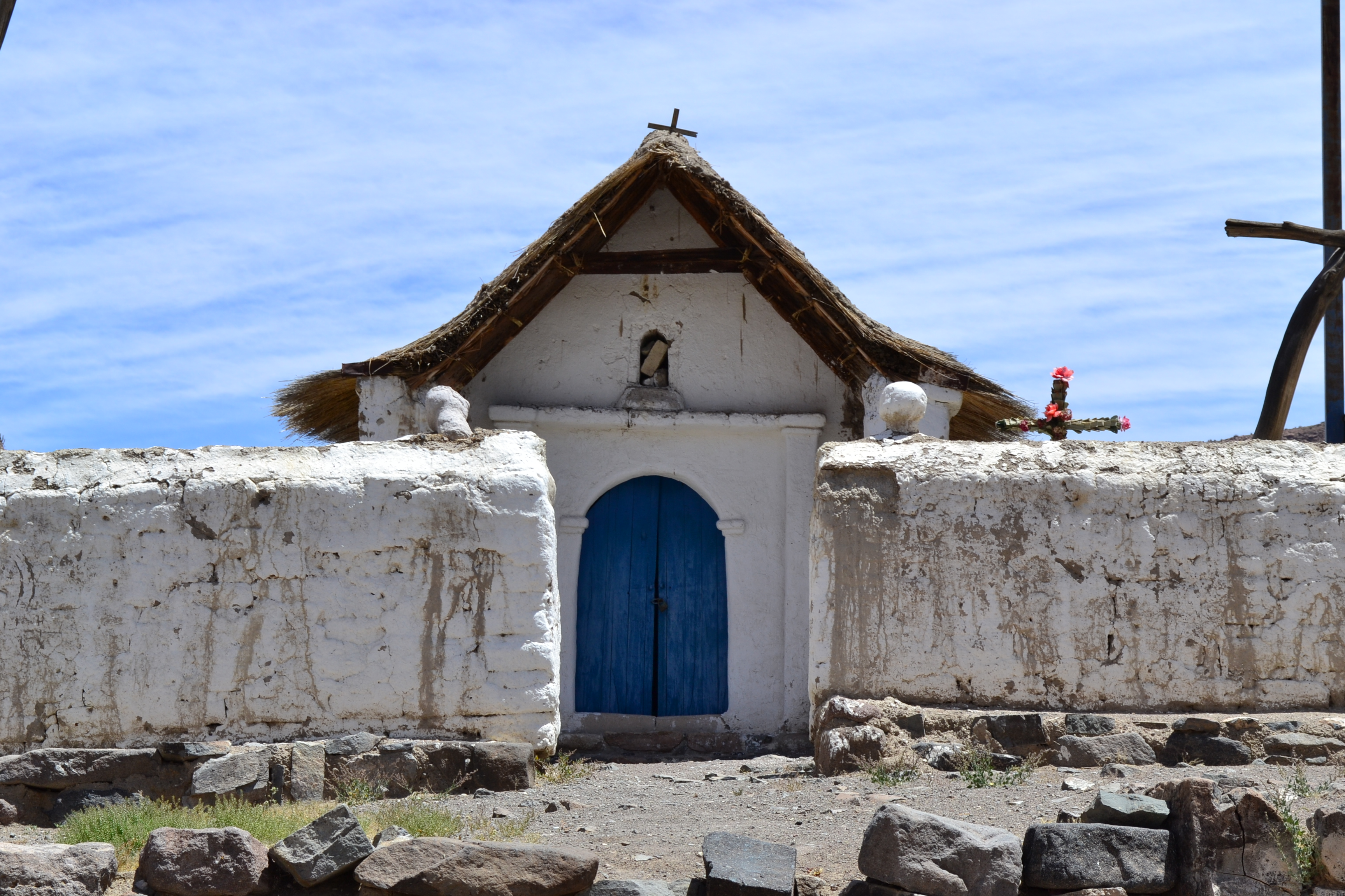 Detalle del muro exterior de la Capilla de Nama. This is a photo of a national monument in Chile: 2058